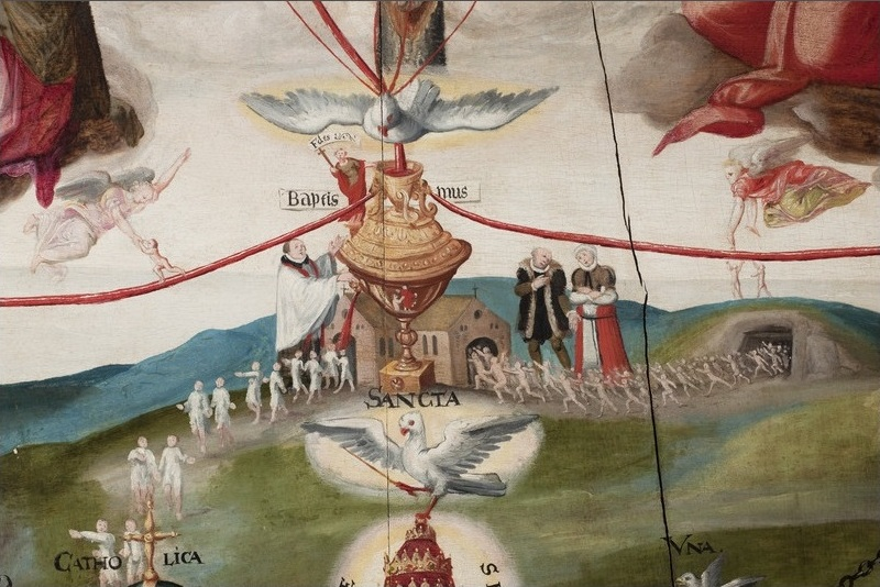 Wrisberg-Epitaph, Detail